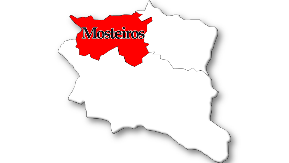 População